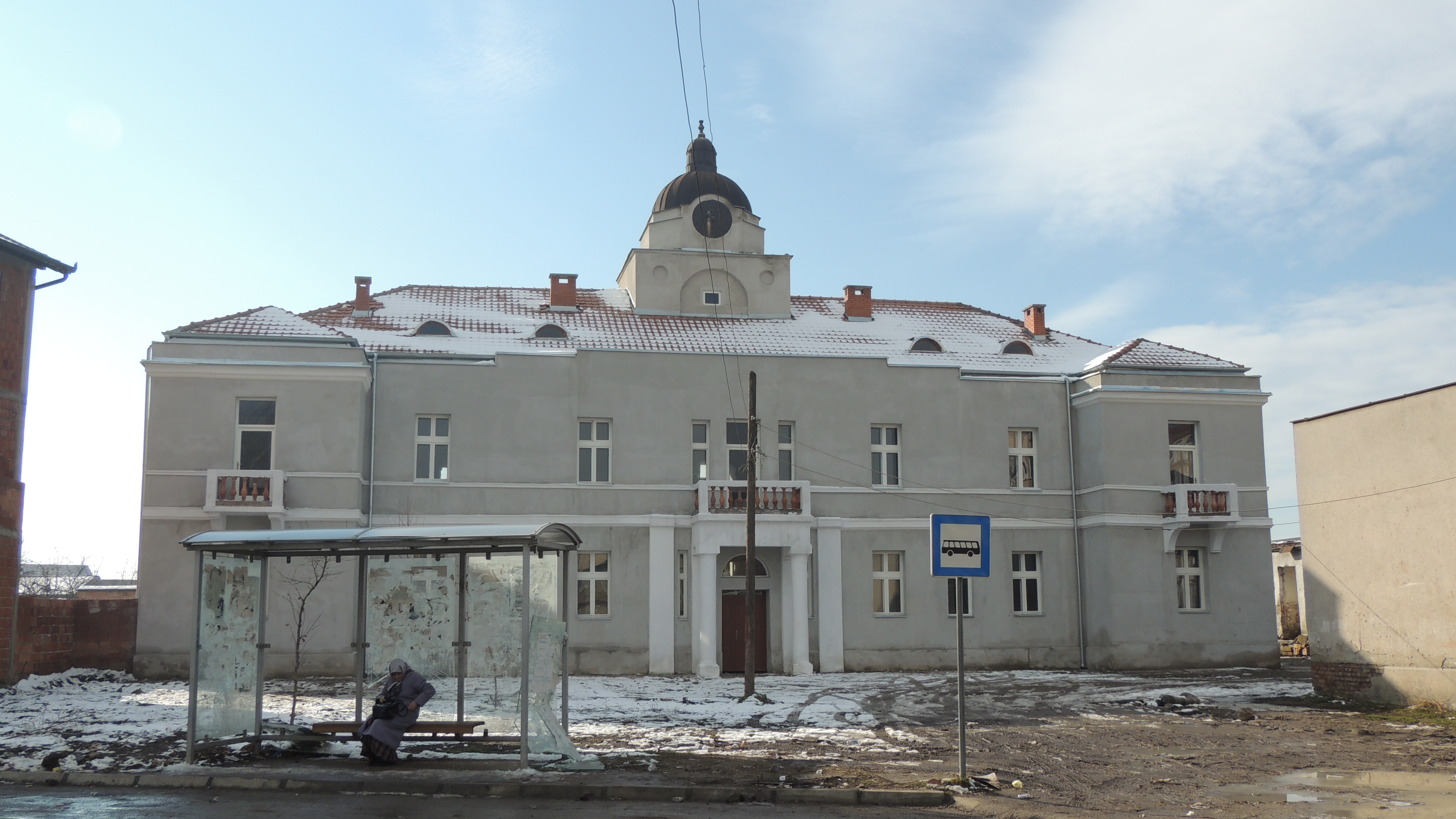 Shtëpi banimi - Mahmut Pashë Gjinolli